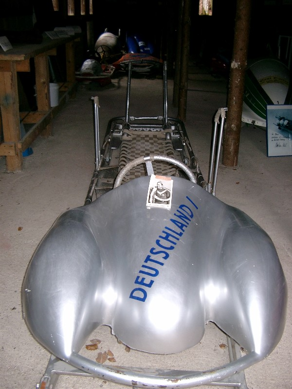 Weltmeister Bob von Oslo 1952